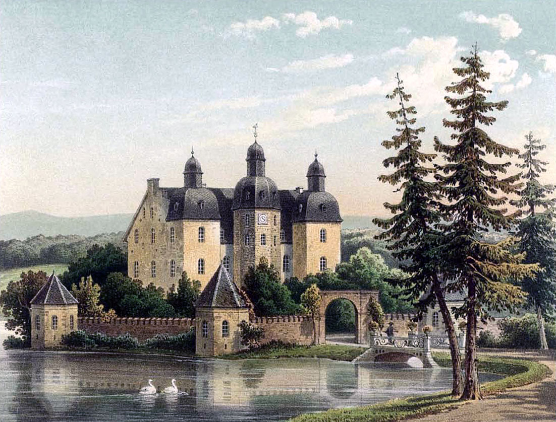 Schloss Holte Nach ein. Orig.. Aufn. v. H. Deiters, ausgef. v. Th. Albert, Druck b. Winckelmann & Söhne Verlag v. Alexander Duncker, Königl. Hofbuchhändler in Berlin